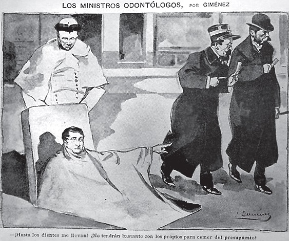 Caricature par Aurelio Giménez, parue dans la revue satirique argentine Caras y Caretas du 13 septembre 1902.